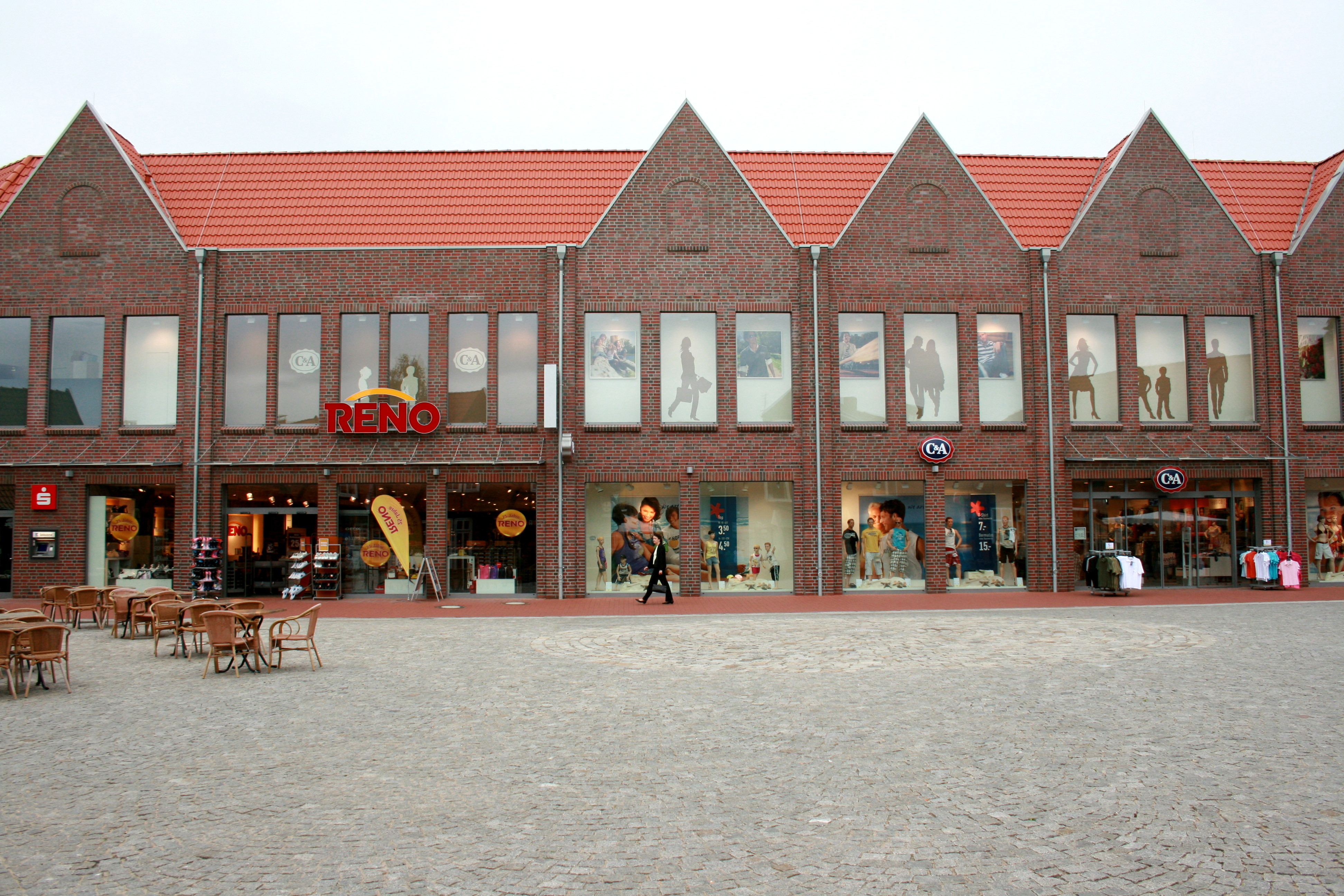 Hagen in Soltau